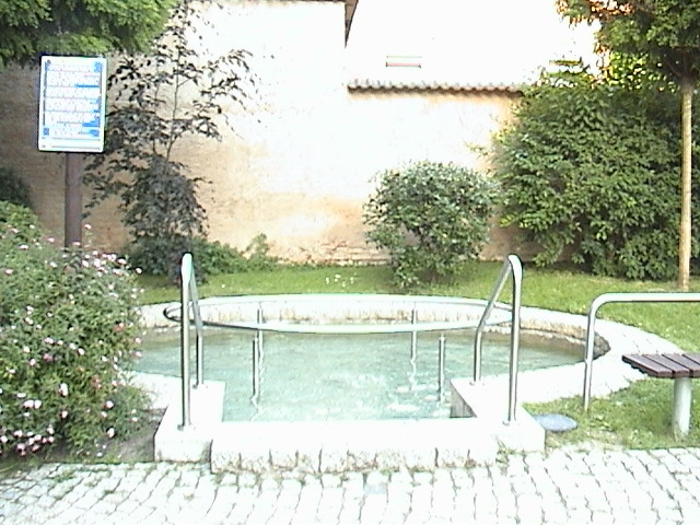 Kneippbad zu Bad Bibra